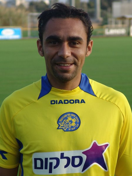 ז'וז'ה רמאליו, שחקן מכבי תל אביב (Joja Romalio of Maccabi Tel Aviv)